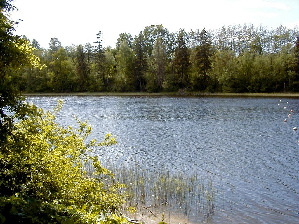 Cieceres ezers pie Brocēniem 2000-05-13